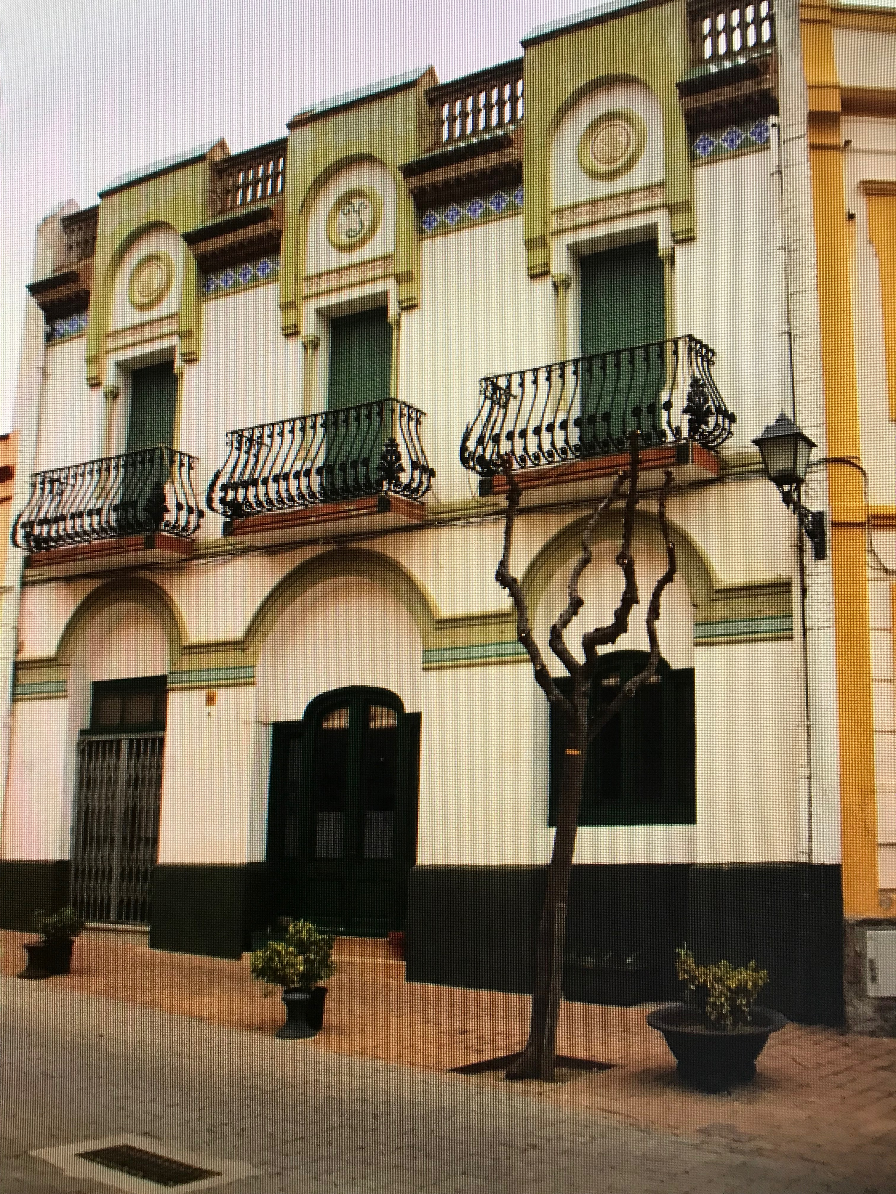 Casa Isidre Macau